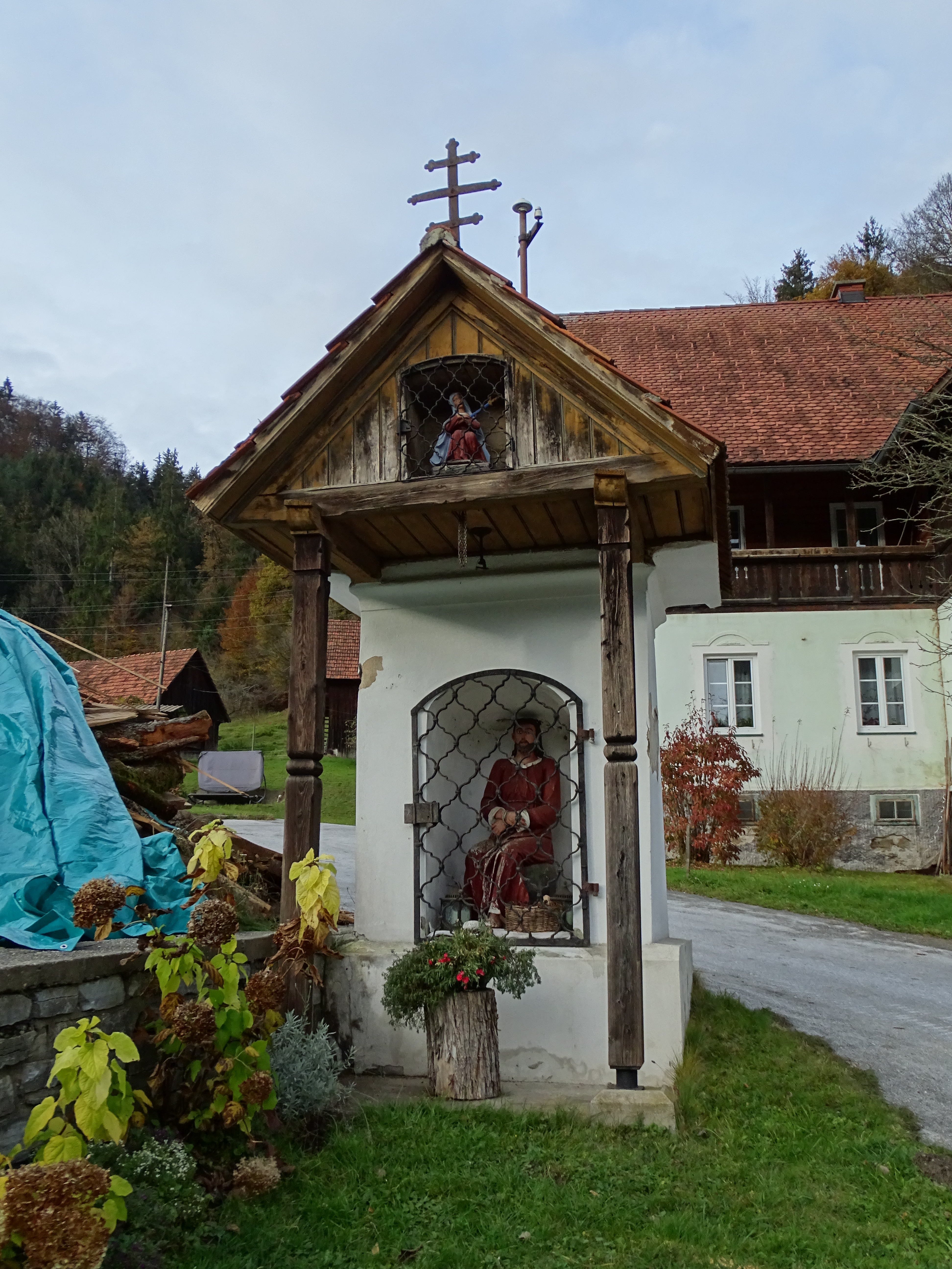 Der Moarhofbauer-Bildstock beim Haus Gößnitzstraße Nr. 14 in Kowald in der Gemeinde Voitsberg. Er wurde am 4. Juli 1897 eingeweiht und die Darstellungen darin wurden 1913 von Franz Schmöl(z)er gemalt. Er zeigt eine Darstellung von Christus als Spottkönig sowie eine Figur der schmerzhaften Mutter Gottes.